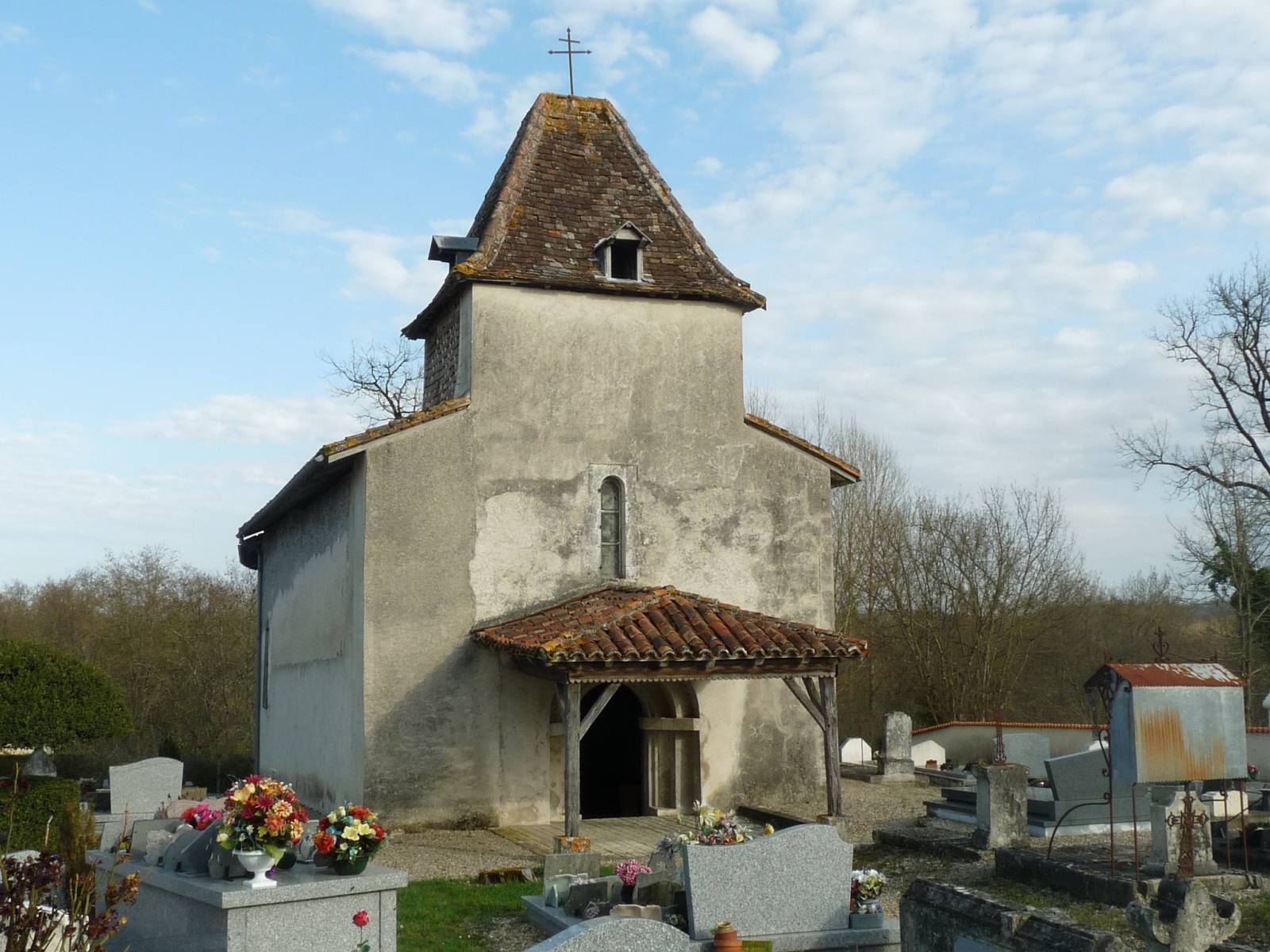 église de Nabinaud, Charente, France